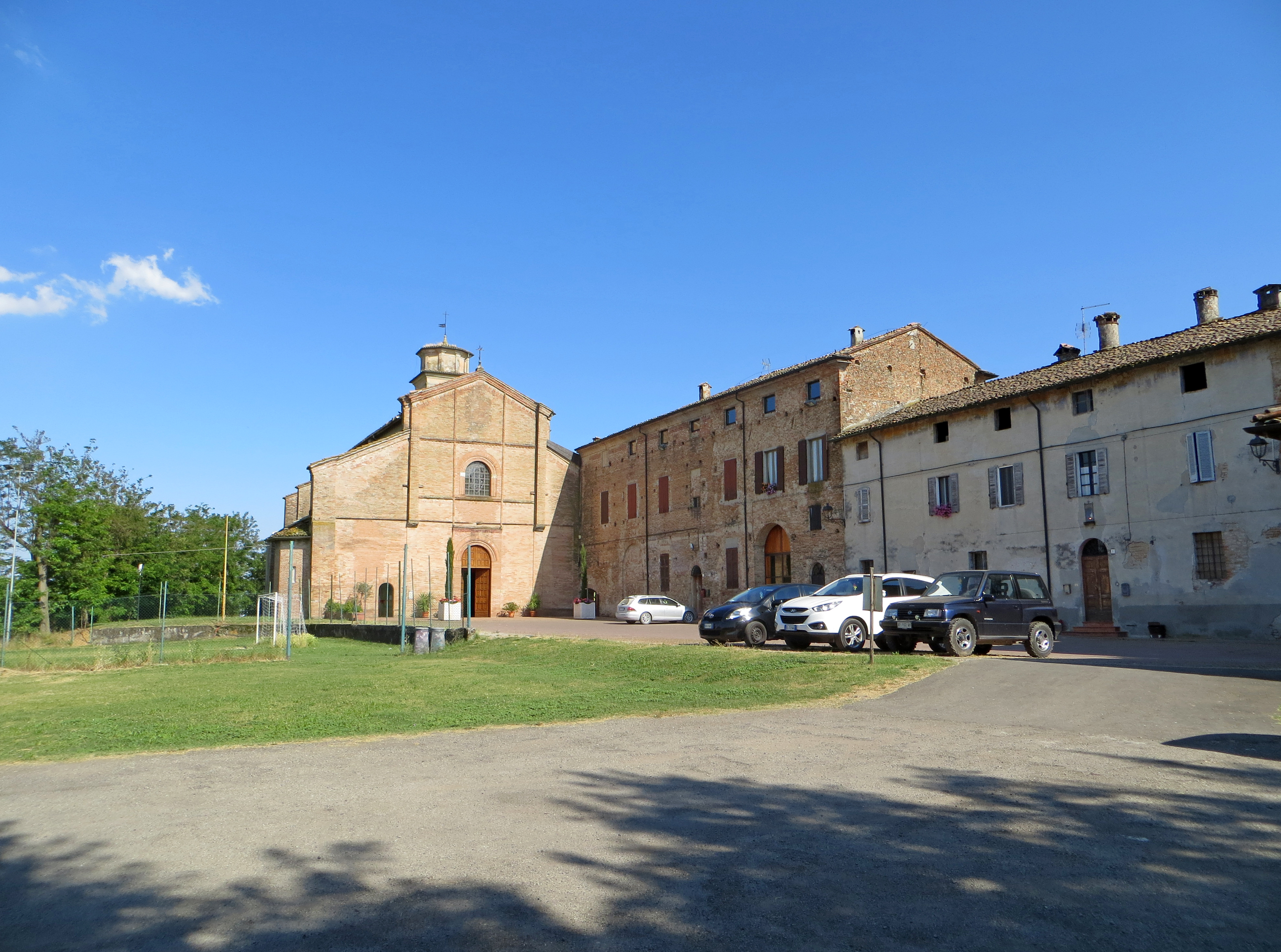 Monastero di Santa Maria Assunta (Castione Marchesi, Fidenza) - chiesa ed edifici annessi